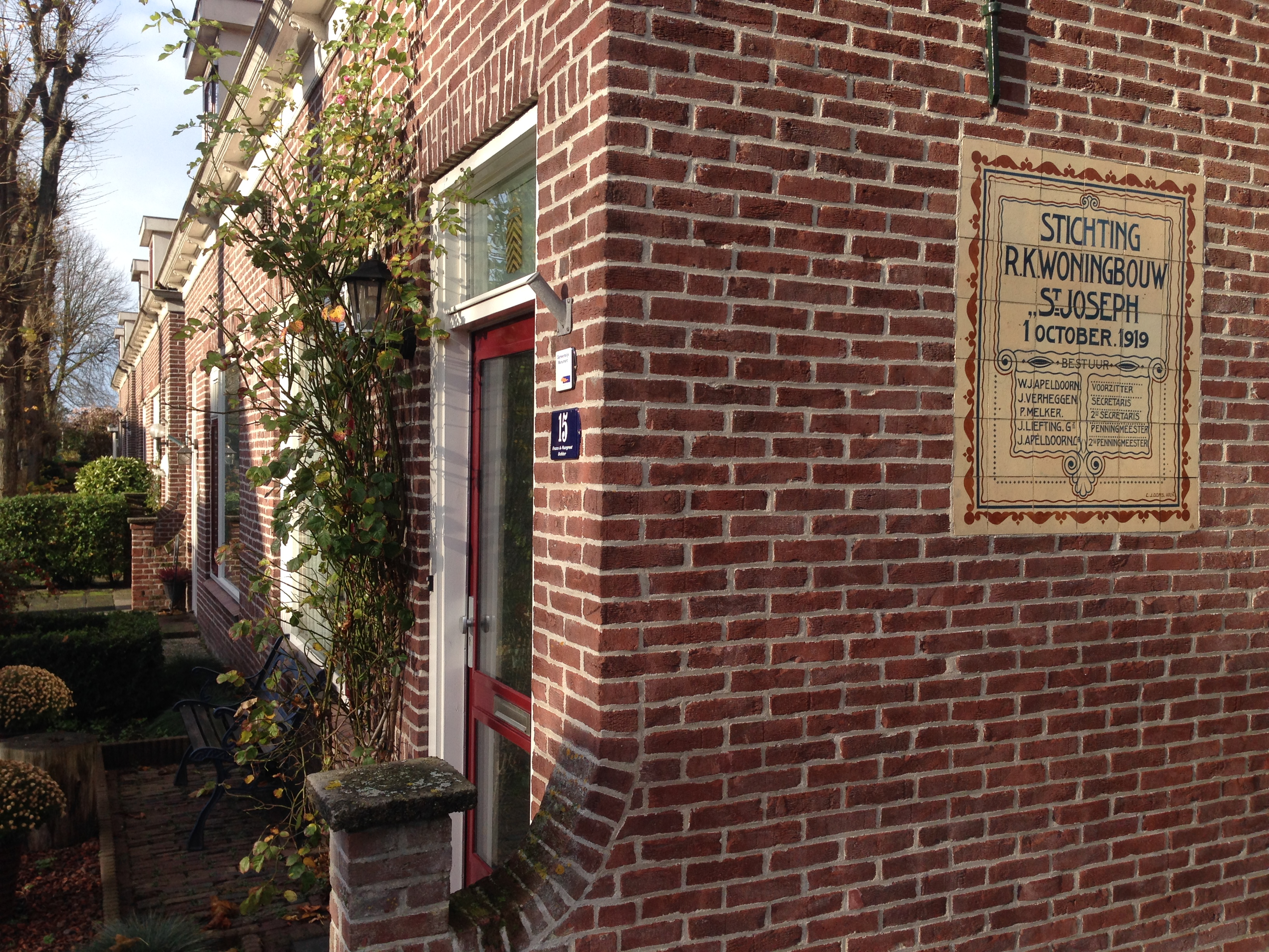 Plaquette woningbouwvereniging Egmond-Binnen